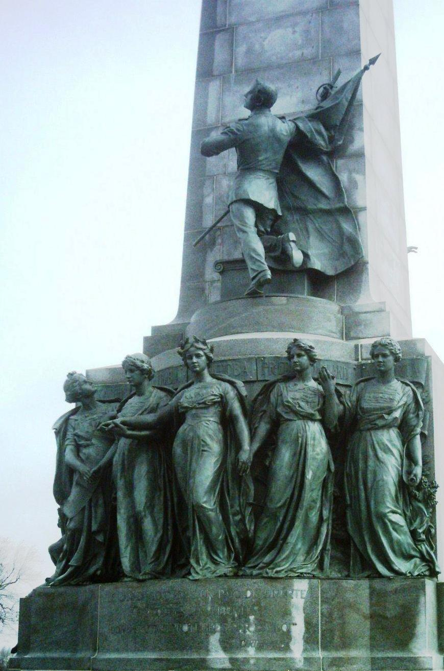 Détail ouest du Monument à George-Étienne Cartier à Montréal